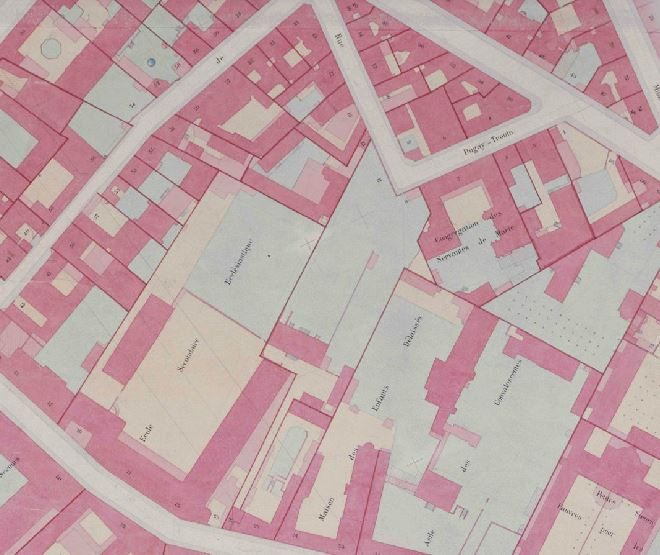 Etat de l'emplacement de la rue Huysmans à la fin du XIXè siècle, avant son percement. Extrait du Plan parcellaire municipal de Paris établi entre 1871 et 1896.